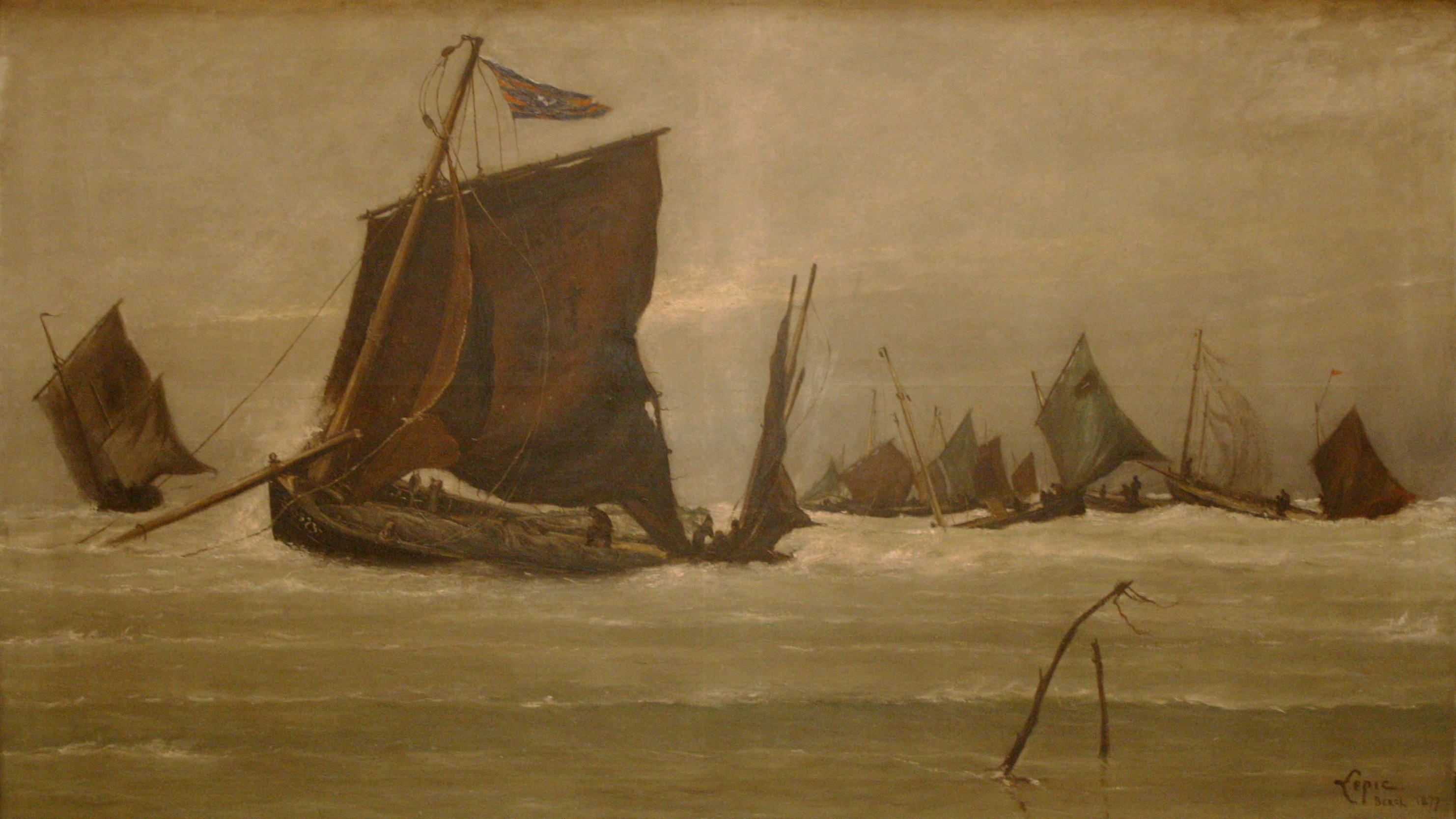 Bateaux de peche rentrant à Berck